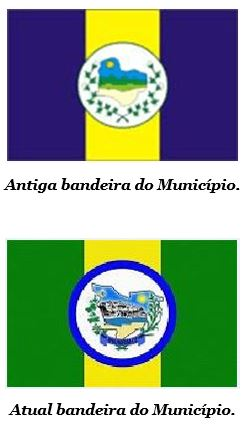 Bandeiras_Ipaumirim